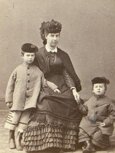 Мария Николаевна Ребиндер (1837—1906; ур. Толстая) с сыновьями Николаем и Алексеем.